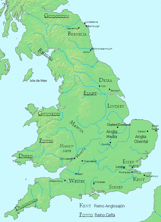 Mapa traducido de la Inglaterra Anglosajona